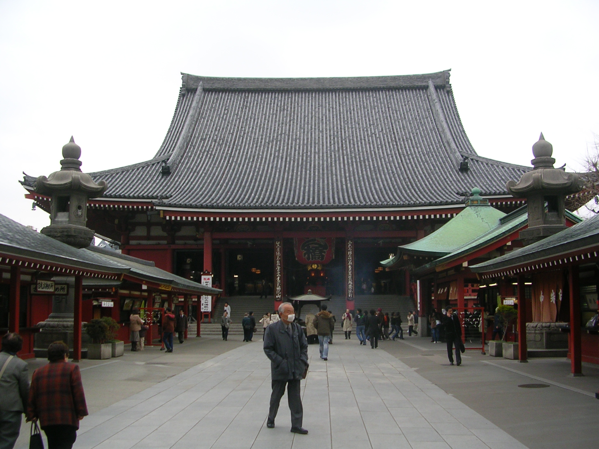 Sensoji, Asakusa, Taito-ku, Tokyo